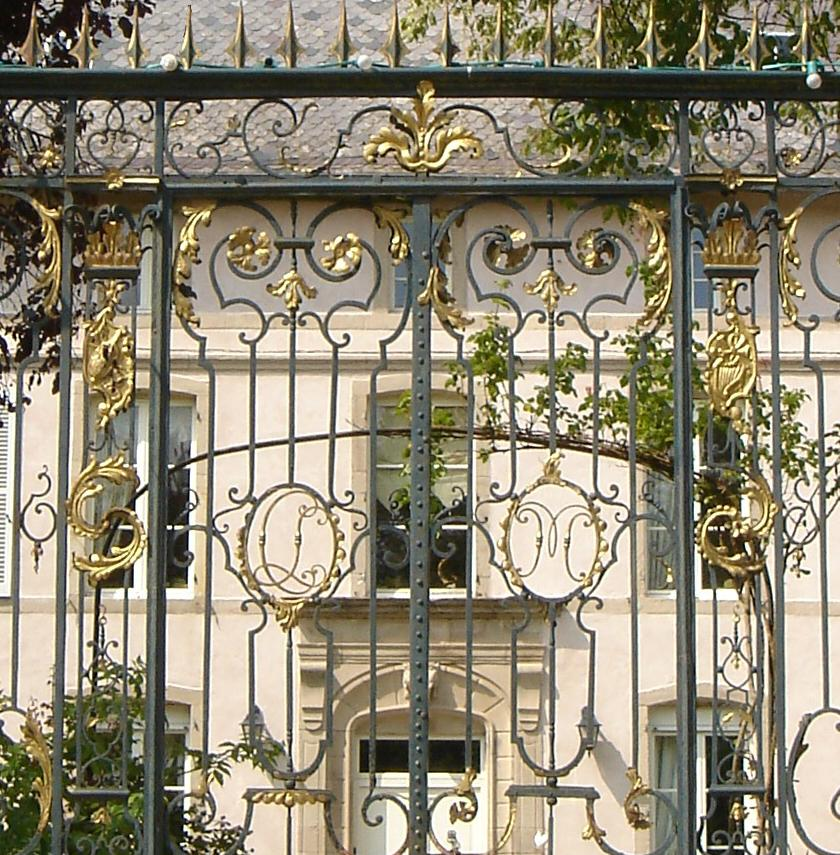 Les grilles du Château de Failloux - Epinal/Jeuxey (France)